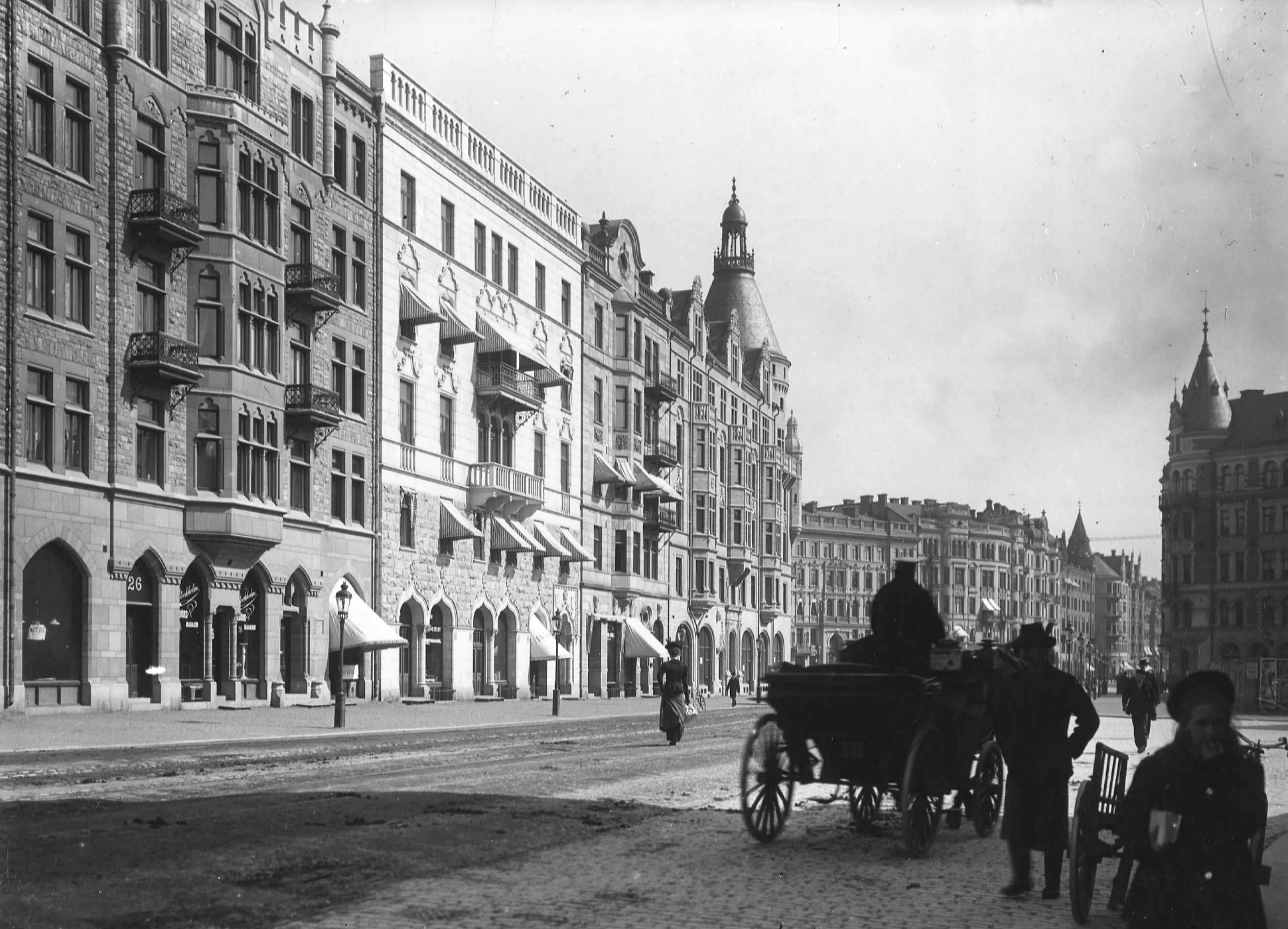 Birger Jarlsgatan 24 (närmast), 22 och 20, söderut